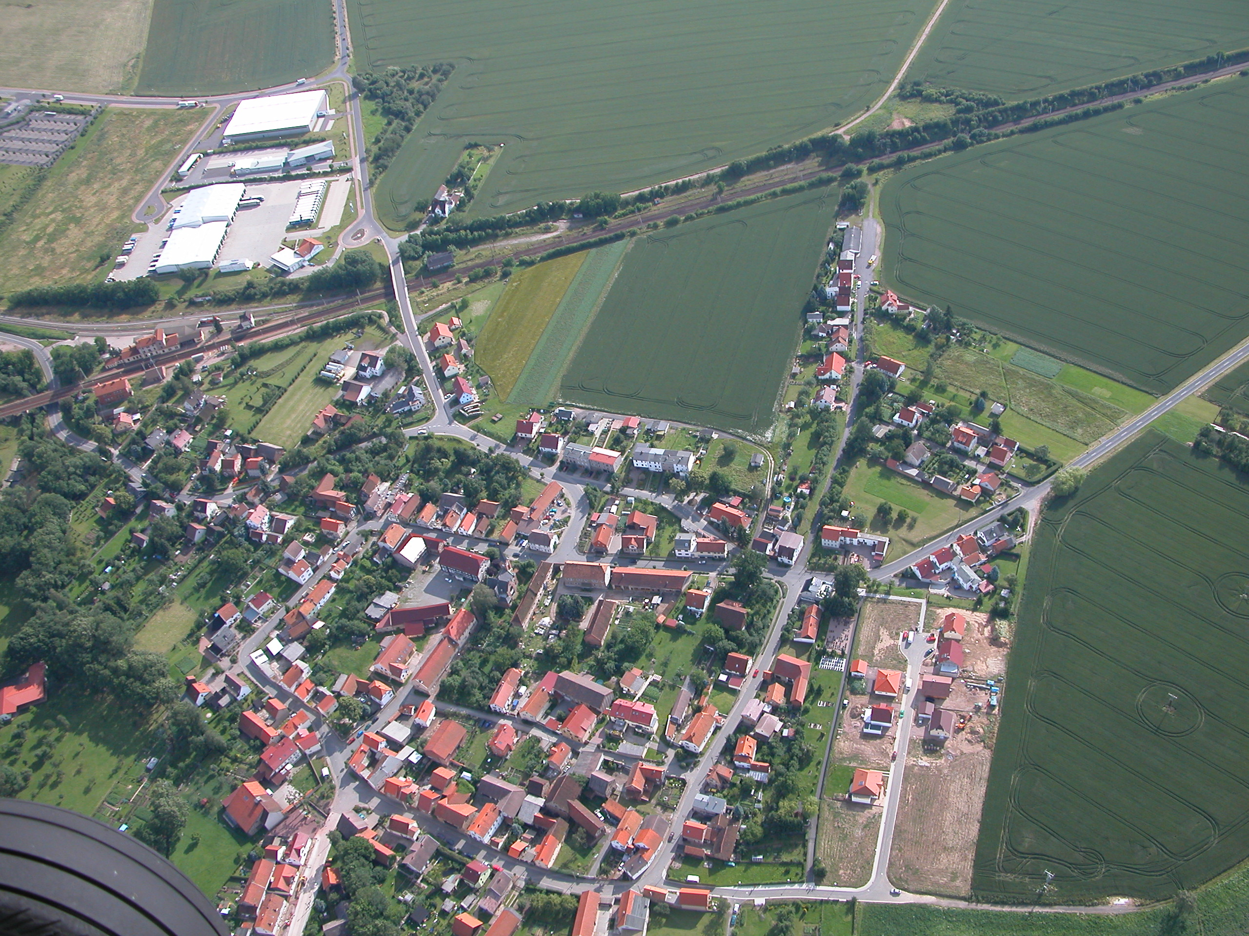 Luftbild von Fröttstädt (GTH)